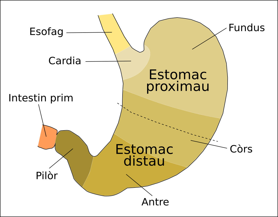 Estructura generala de l'estomac.